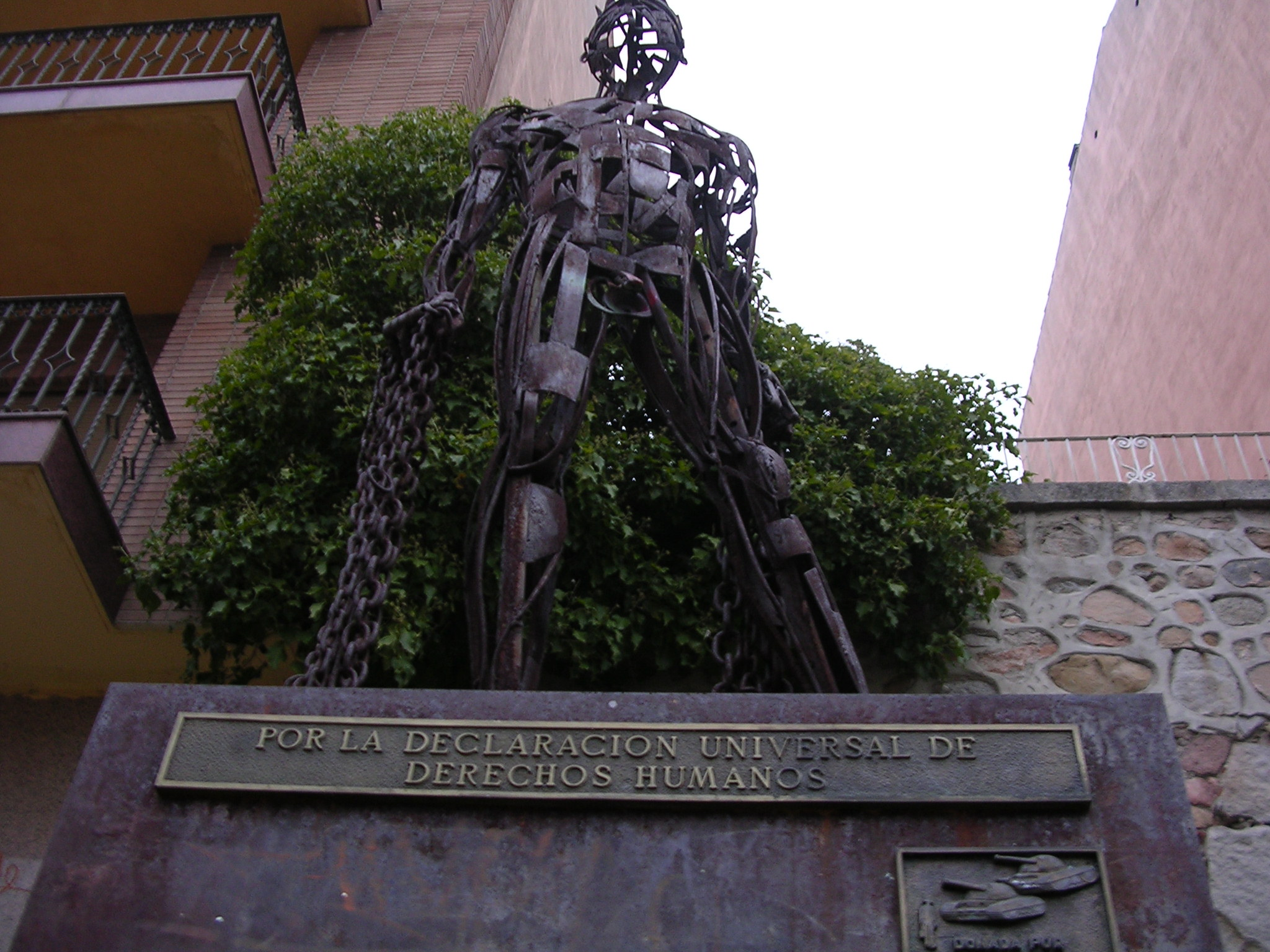 Estatua situada en el jardín de San Roque donada por el Grupo de Ávila de Amnistía Internacional y realizada por Jose Antonio Elvira recordando los sucesos de Tiananmen, China